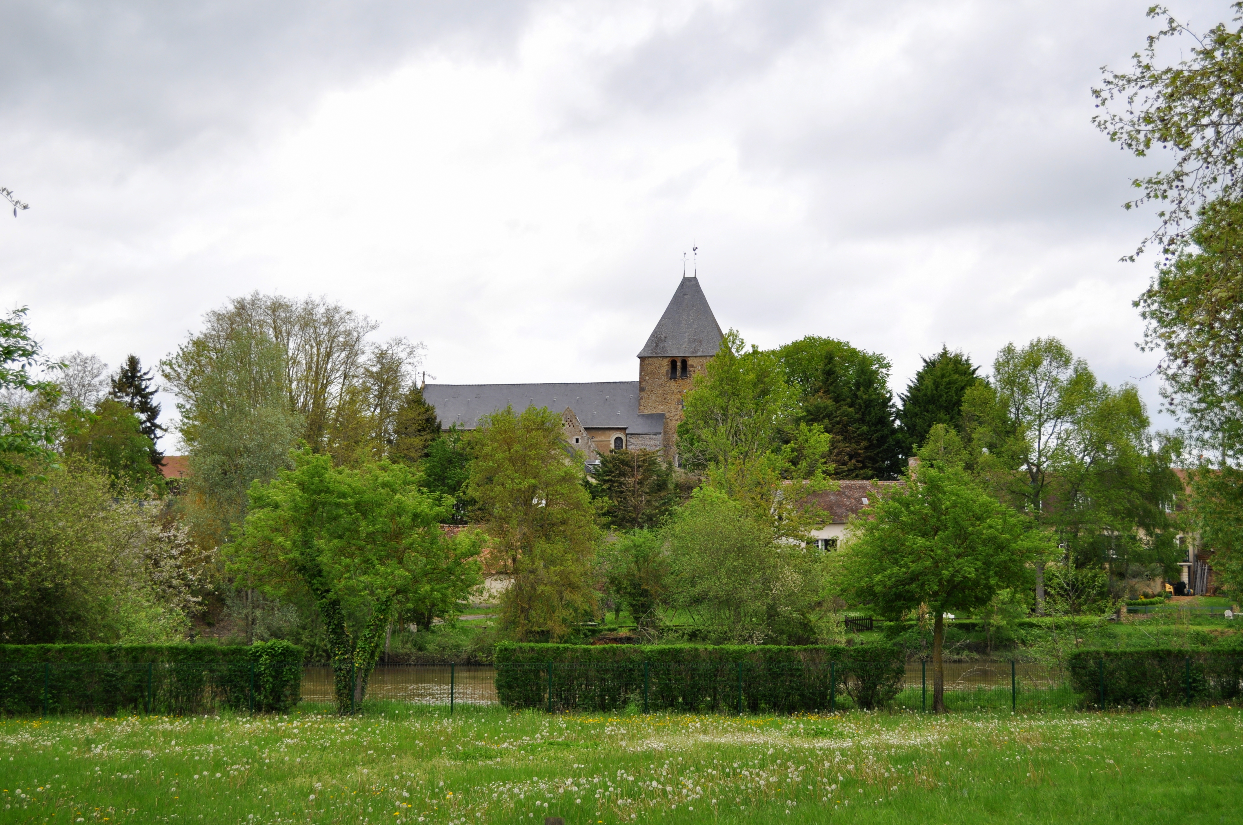 Vue générale de Roézé-sur-Sarthe (Sarthe)